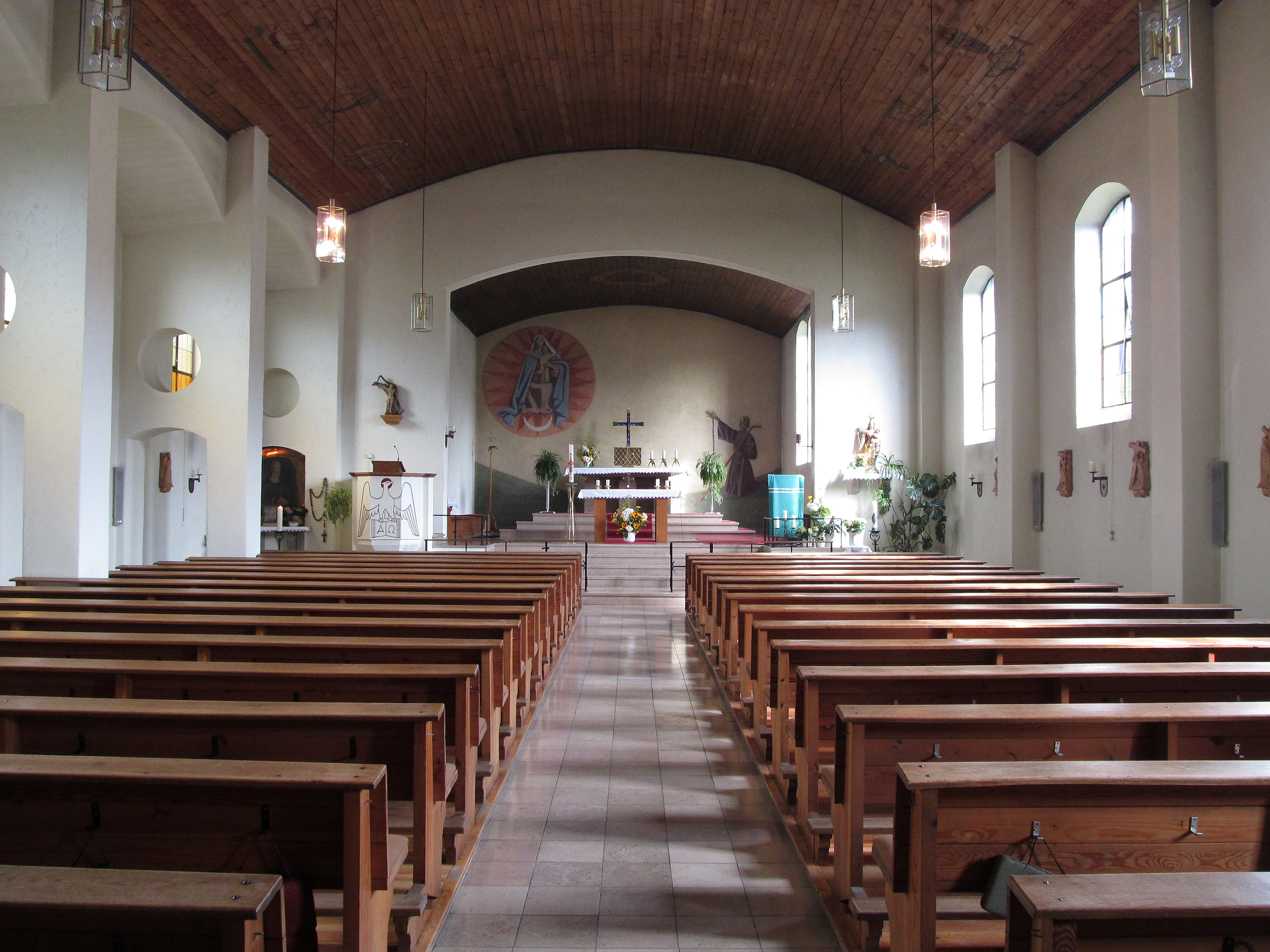 Blick ins Innere der katholischen Pfarrkirche "Bruder Klaus" in Niedergailbach, Gemeinde Gersheim, Saarland